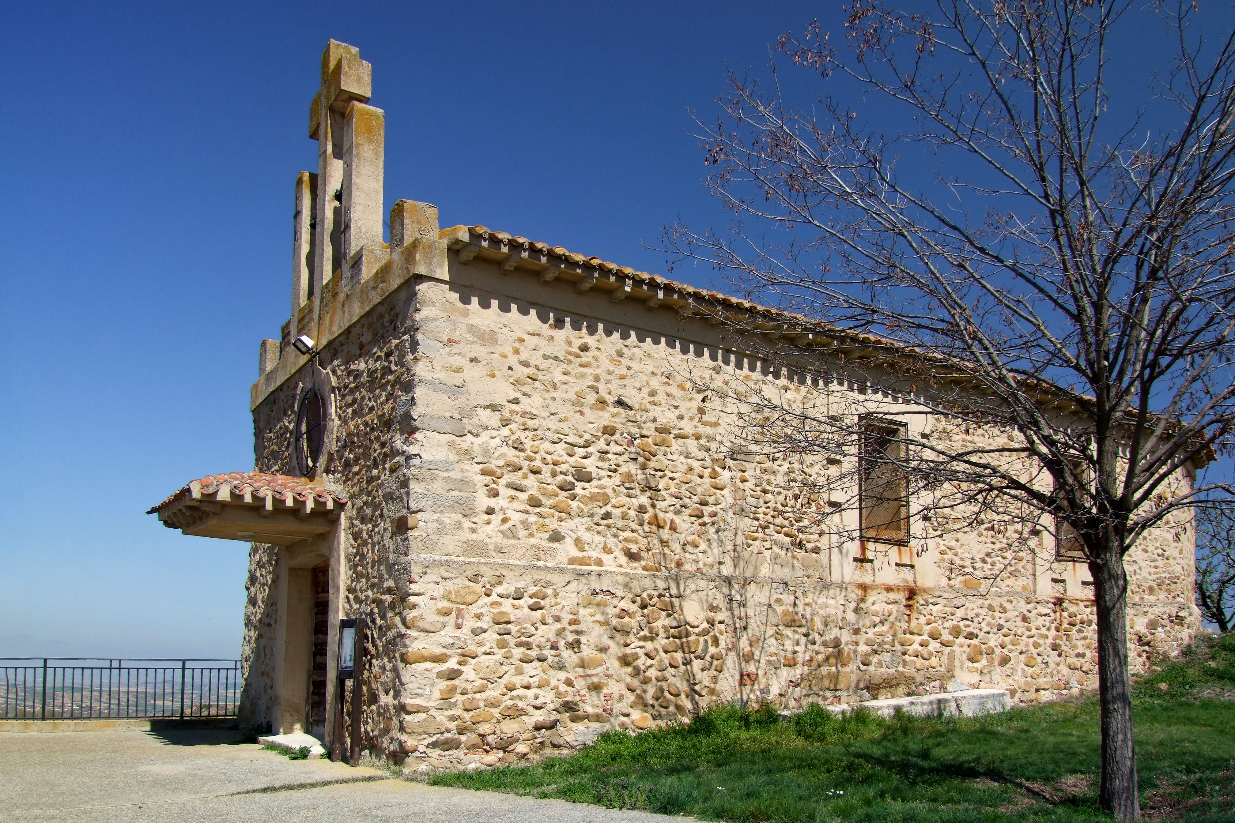 Ermita de Santa María de Velilla en la localidad de Los Molinos de Ocón, La Rioja - España